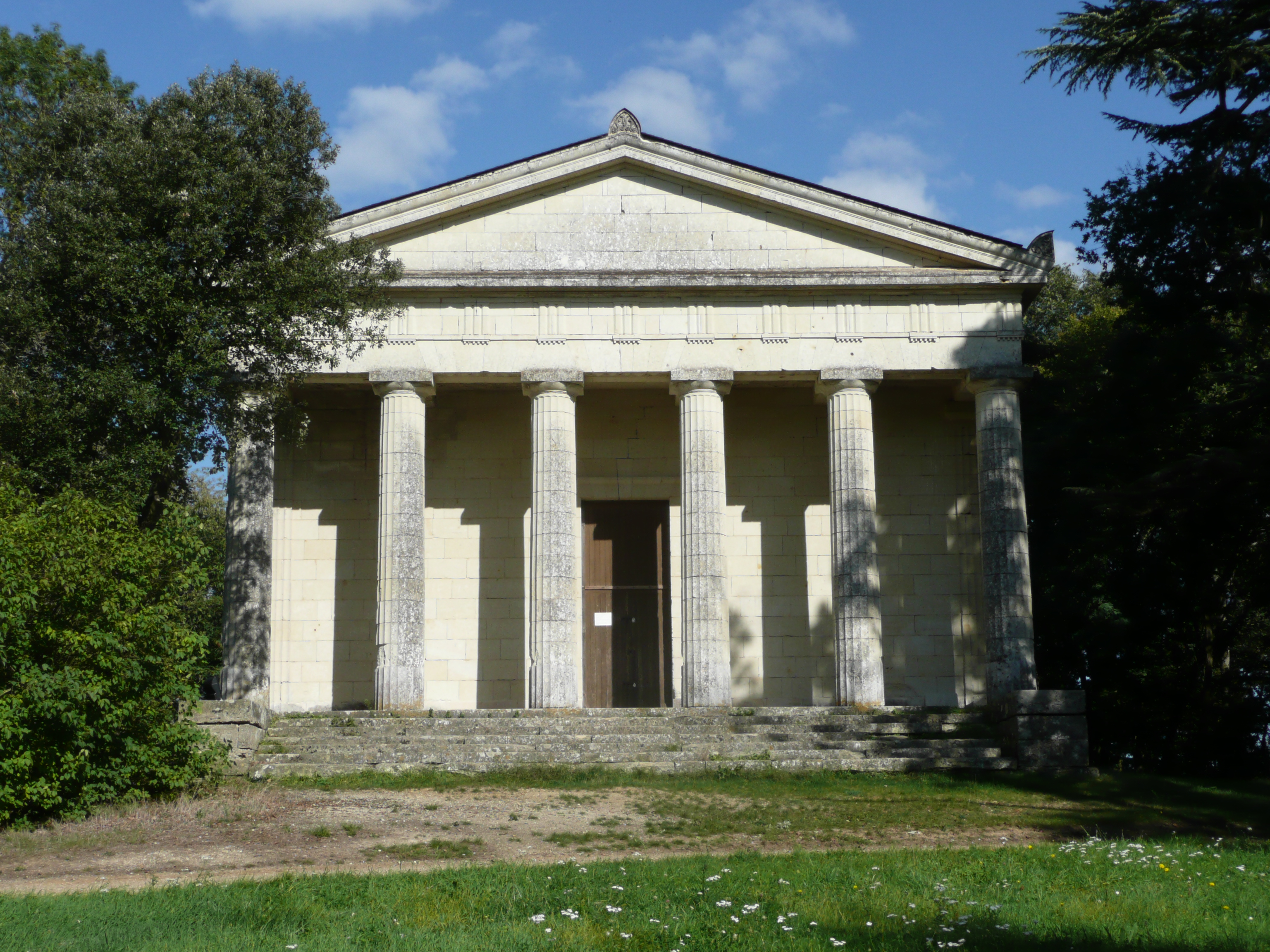 Brissac - Mausolé .